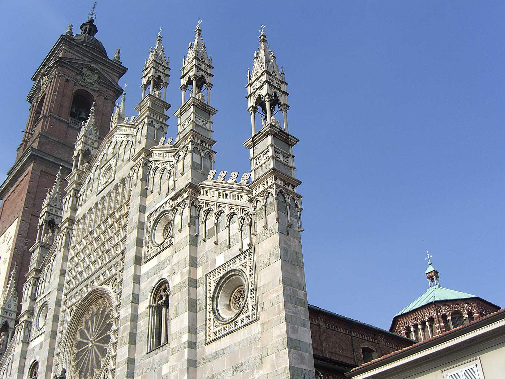 MB Monza Duomo facciata a vento, campanile e tiburio